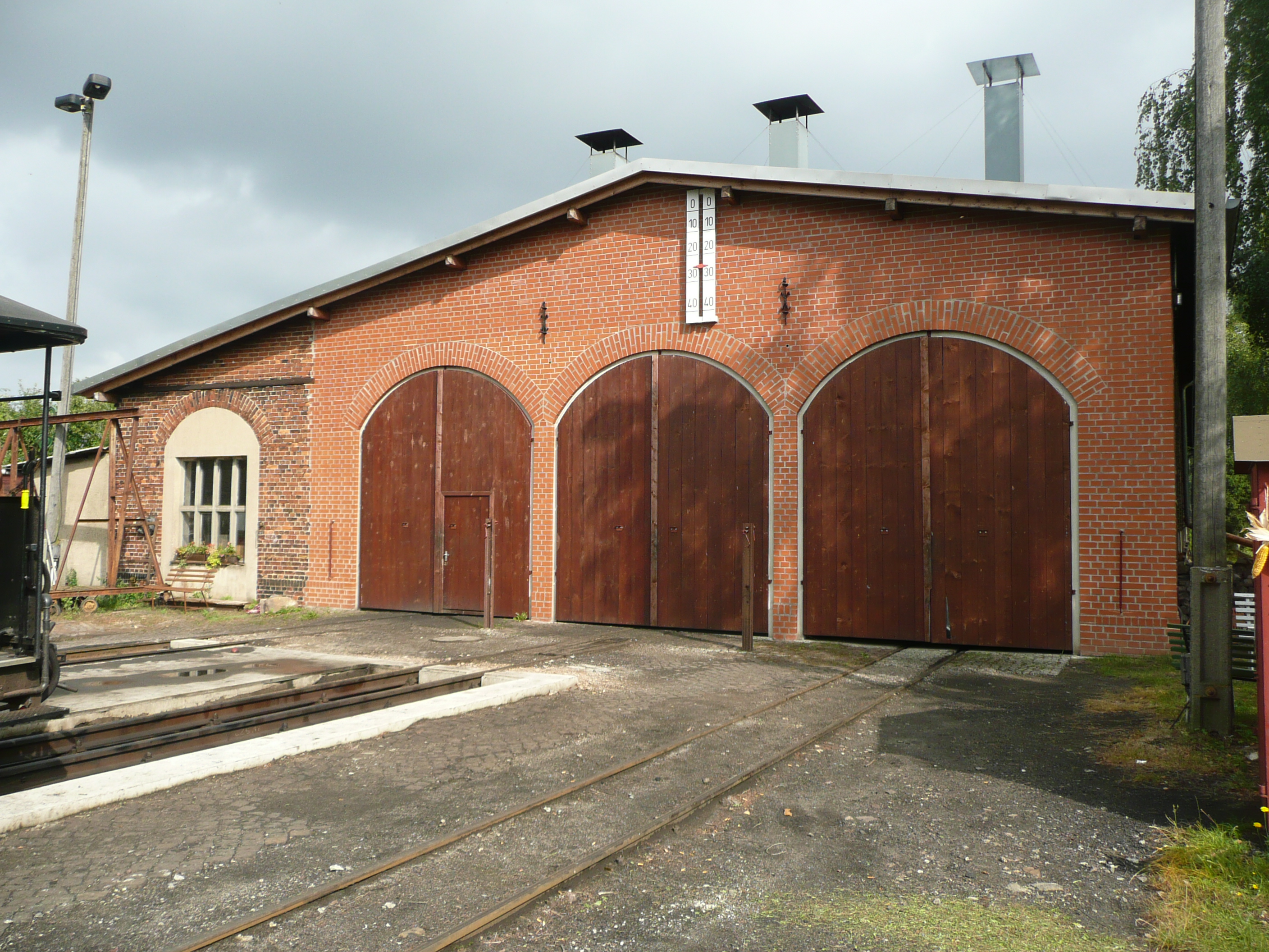 Lokschuppen des Bahnhofs Mügeln